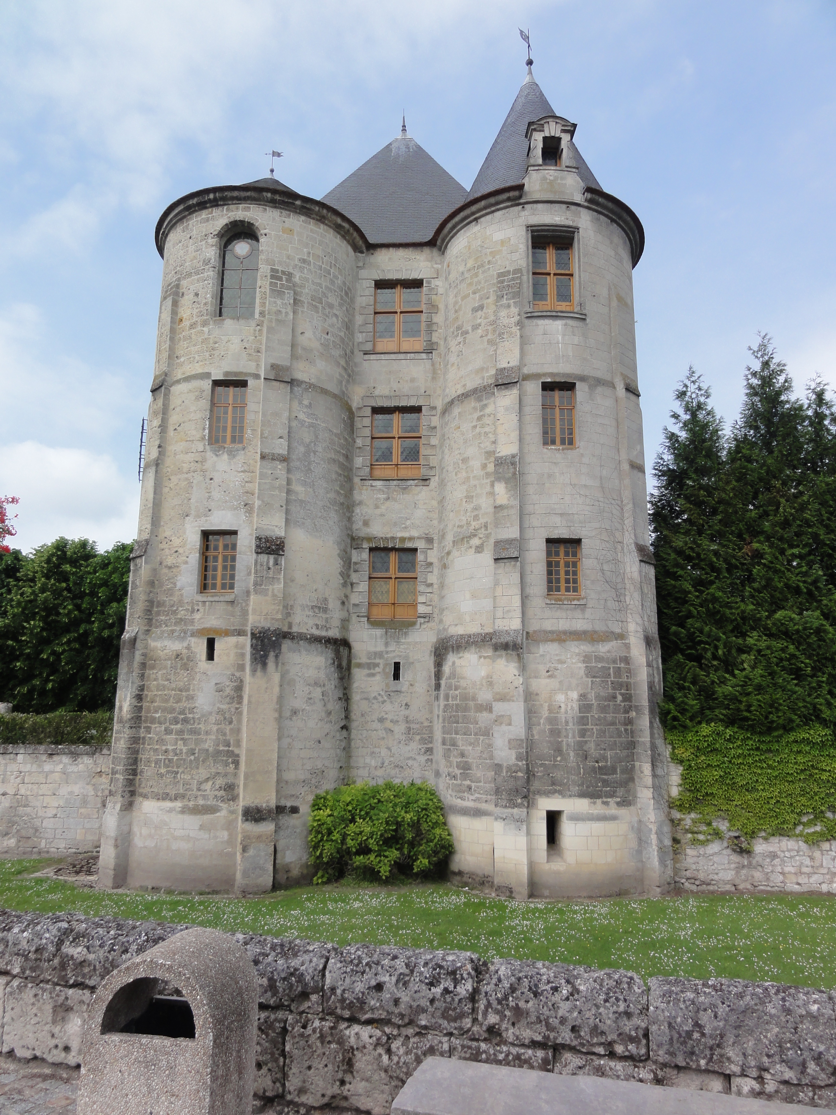 Château de Vic-sur-Aisne, le donjon This building is en partie classé, en partie inscrit au titre des Monuments Historiques. .